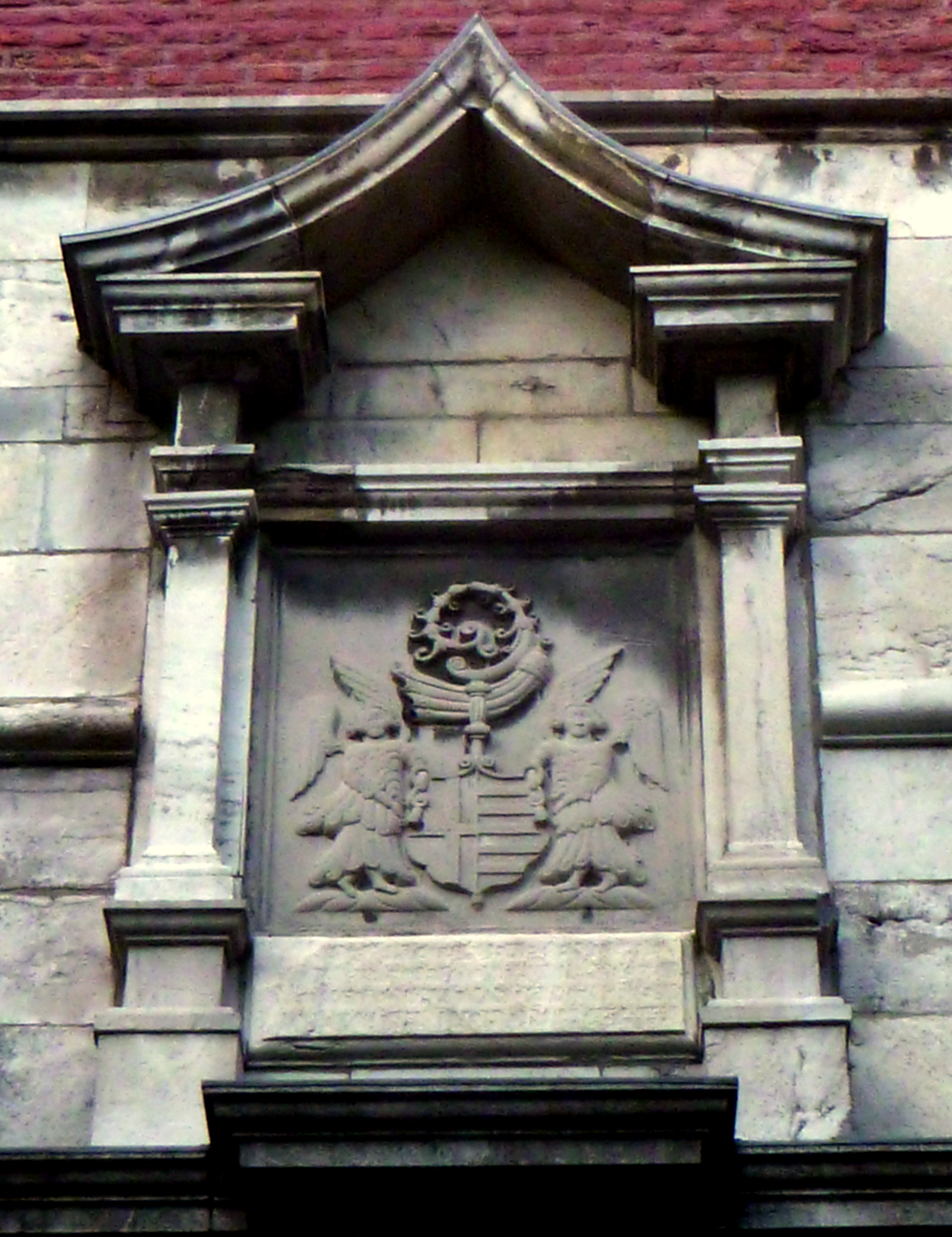 Wappenstein der Äbtissin Henriette Raitz von Frentz über dem Abteitor der Abtei Burtscheid